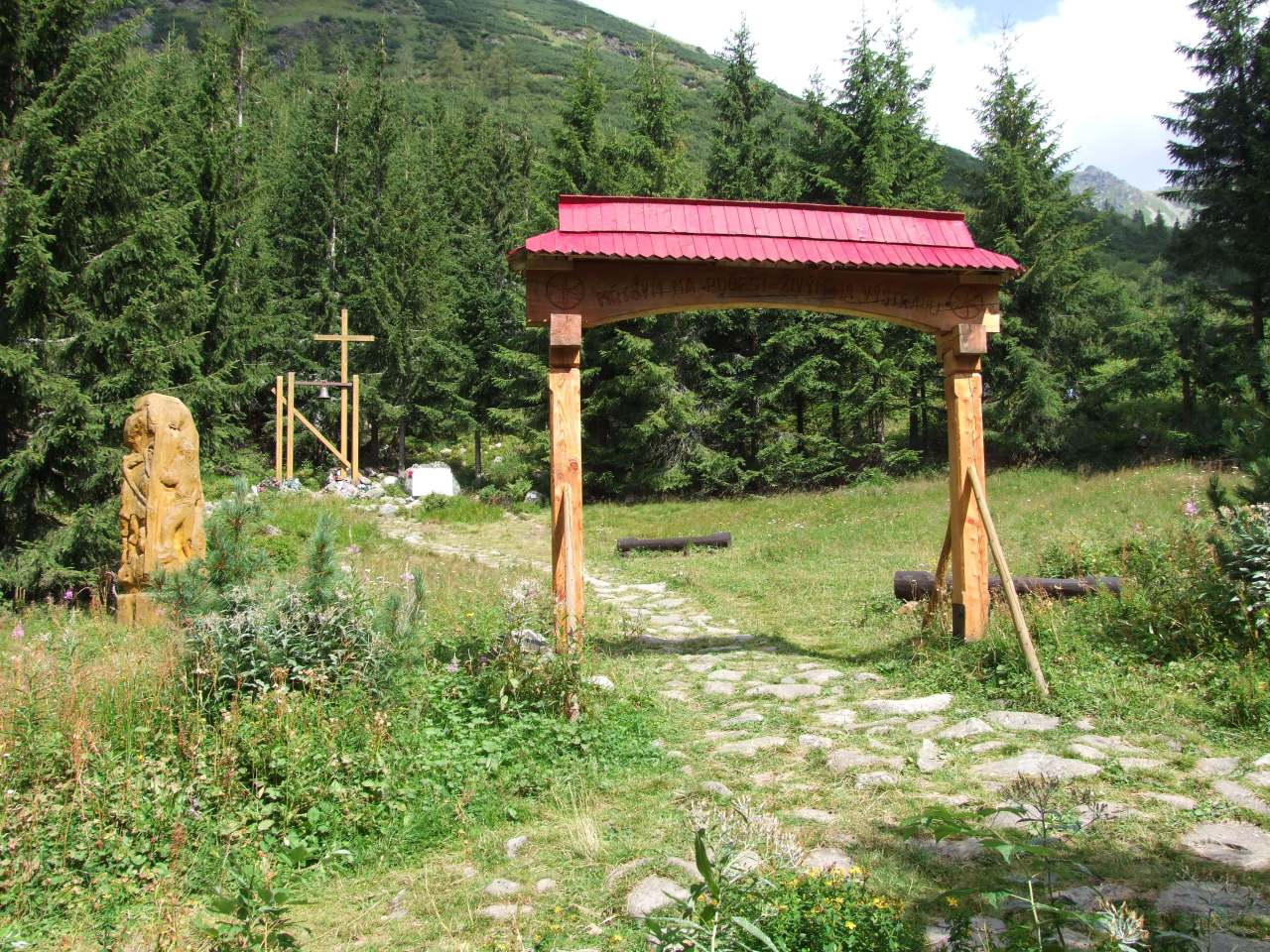 Symboliczny cmentarz ofiar Tatr Zachodnich przy Żarskim Schronisku